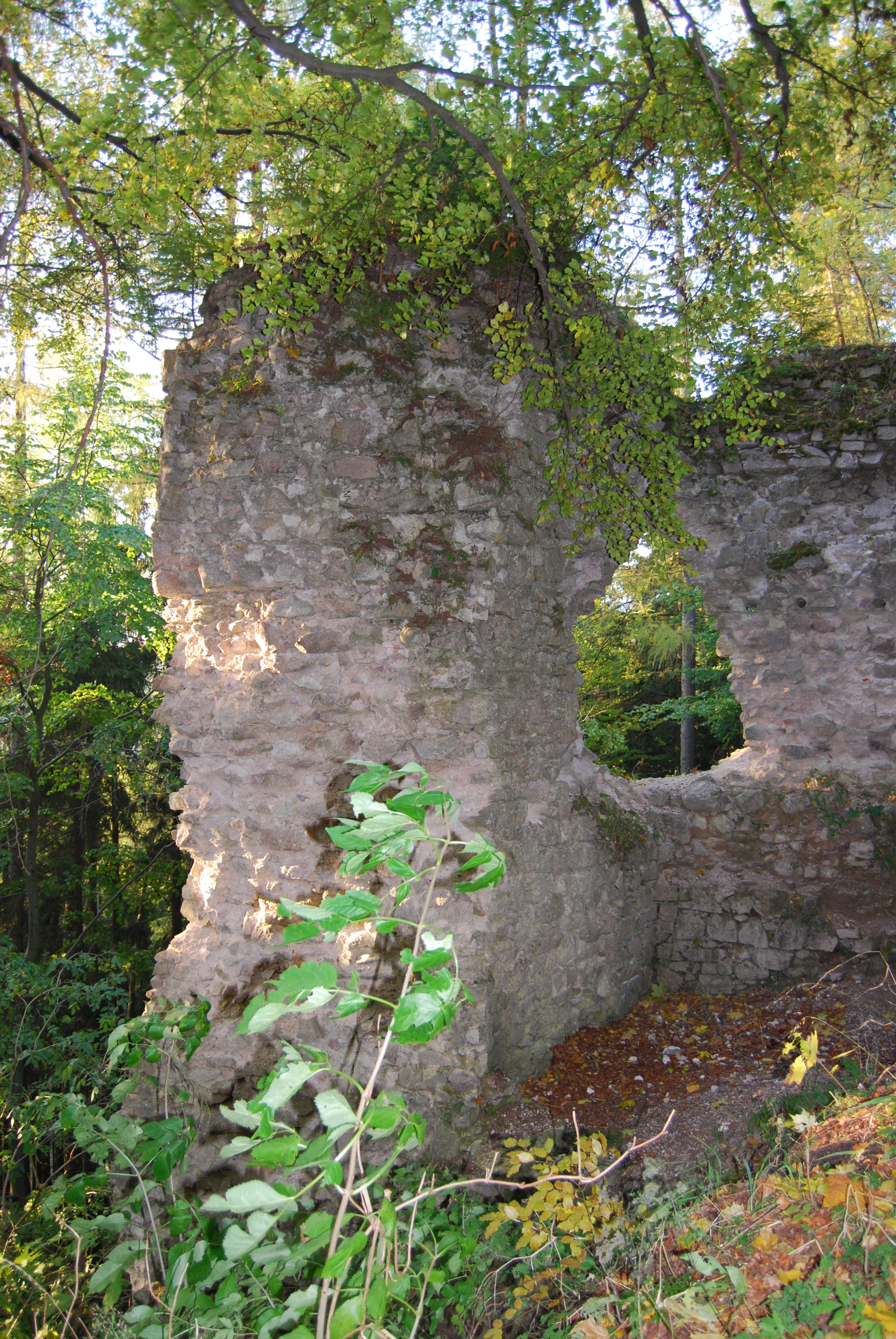 Kynžvart. Zřícenina hradu na pokraji Slavkovského lesa v okrese Cheb. Asi 1 km severně od obce Lázně Kynžvart. Čechy.